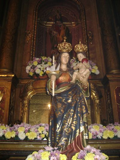 Imagen de la Virgen de Nuestra Señora de Bonaria.